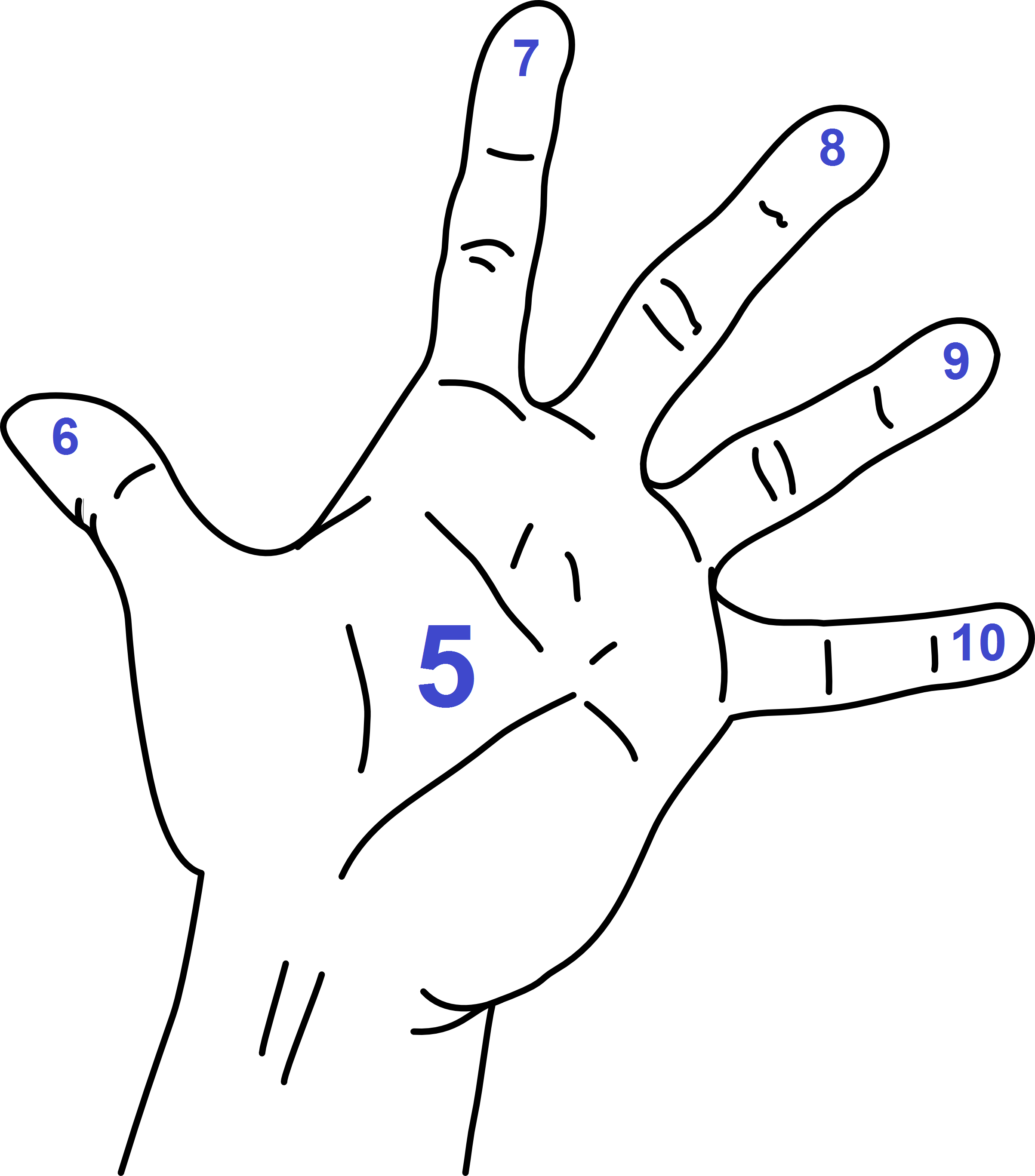 כפל באמצעות אצבעות הידיים